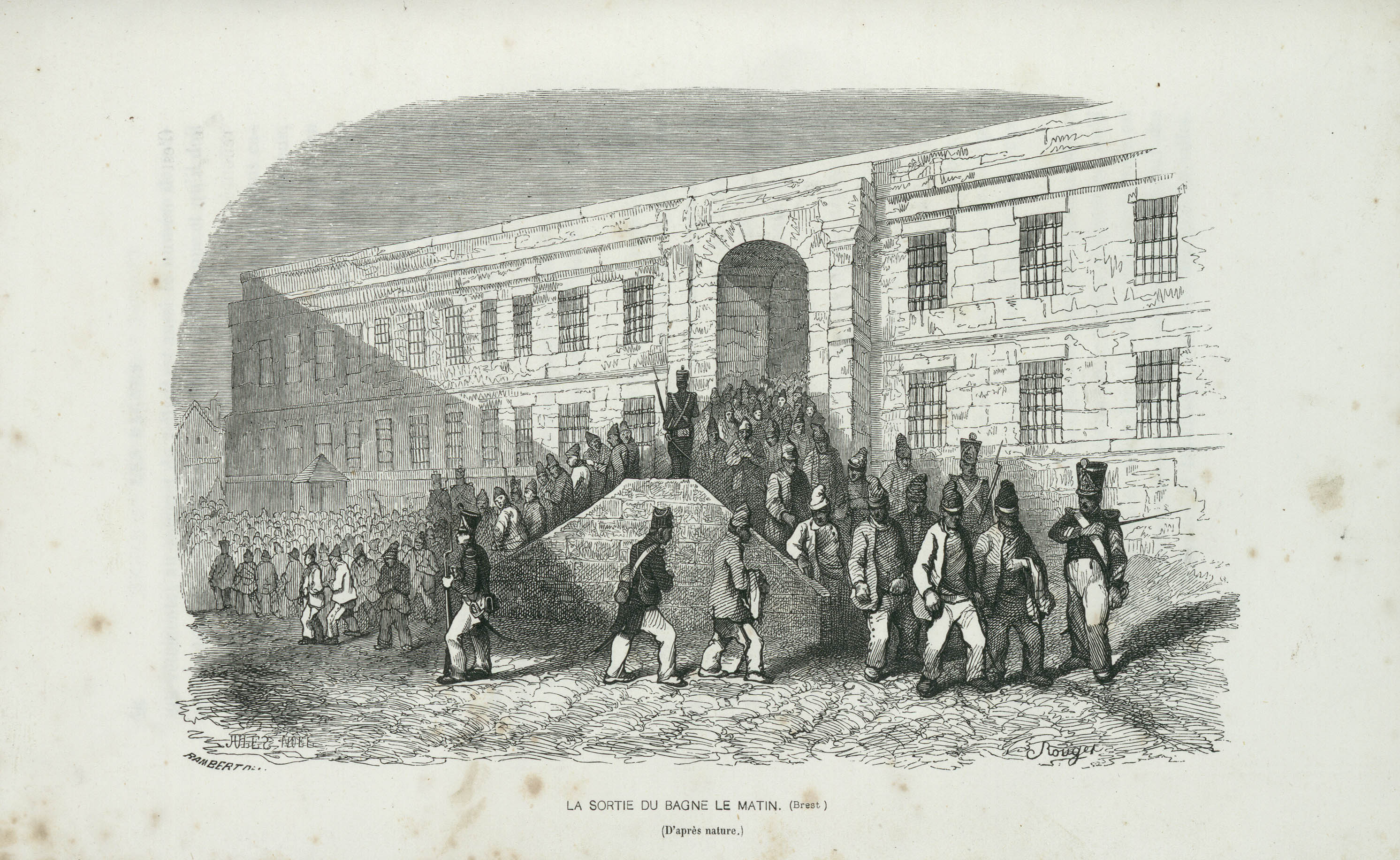 Les forçats sortent du Bagne de Brest pour aller au travail, sous la surveillance des gardes-chiourme. le dessinateur a pris de grandes libertés avec l’architecture de la façade.